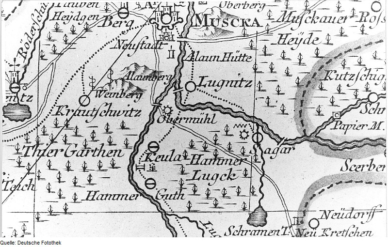 Original image description from the Deutsche FotothekKrauschwitz-Keula. Oberlausitzkarte, Schenk, 1759